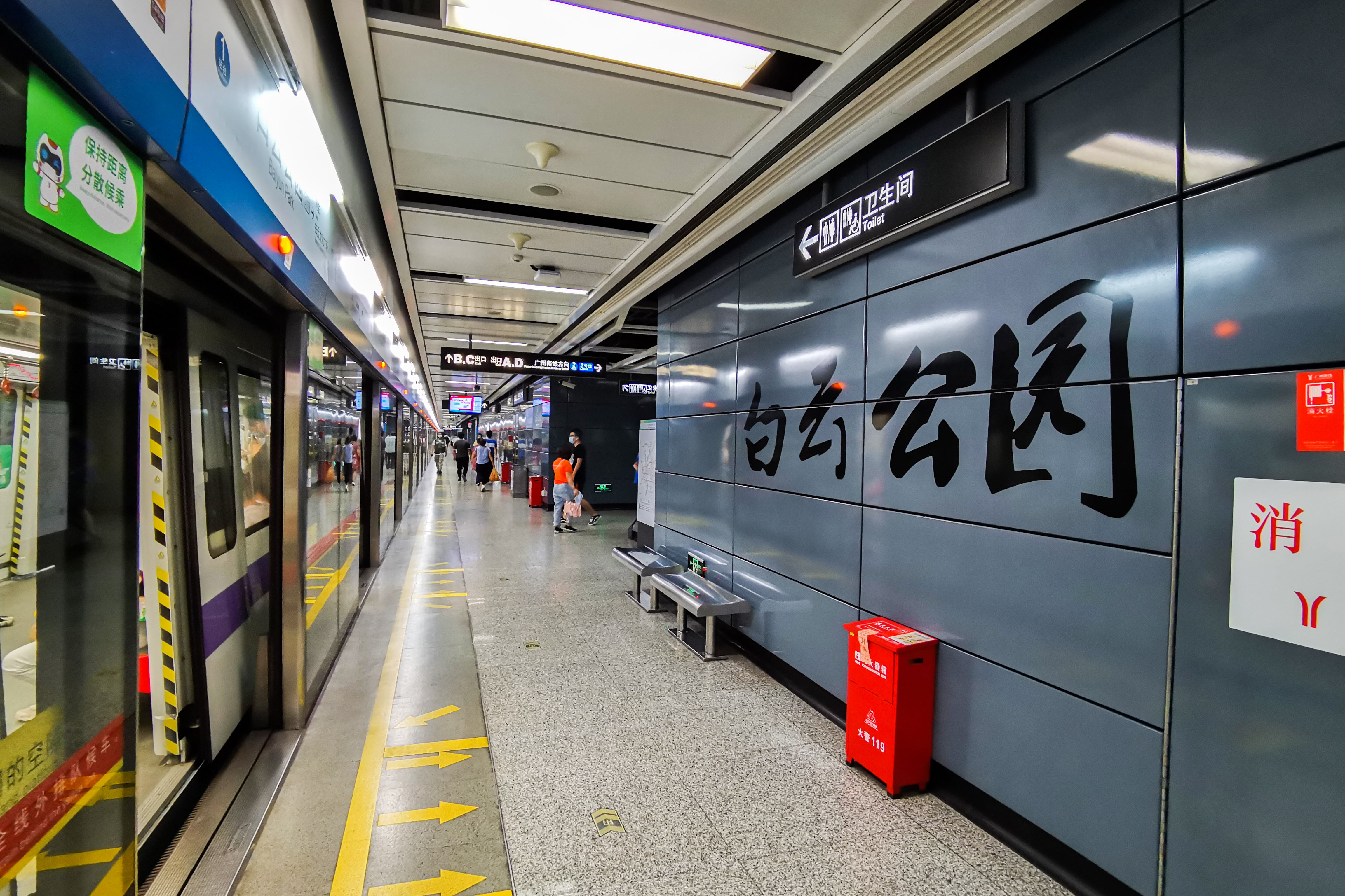 广州地铁白云公园站